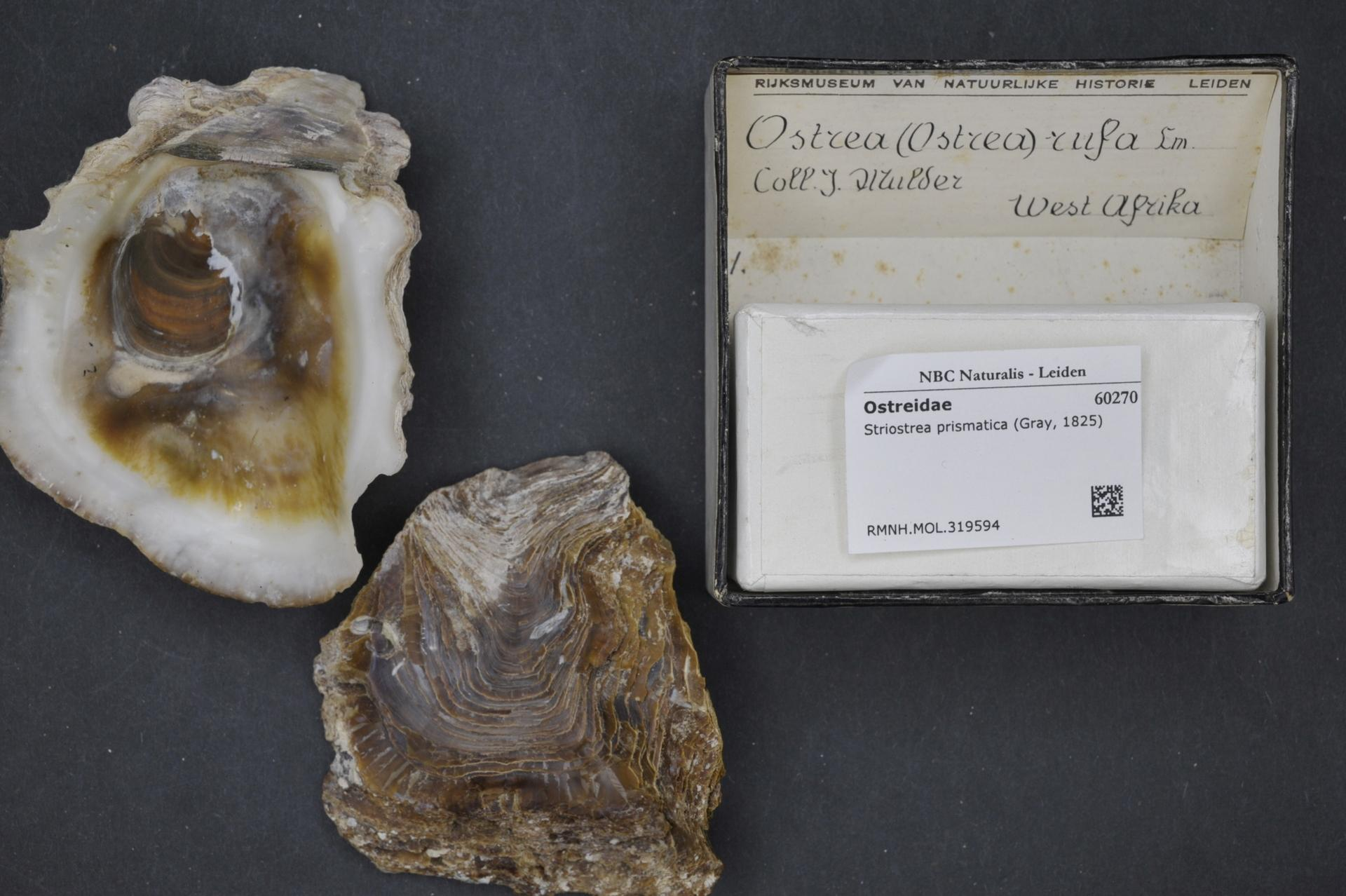 Striostrea prismatica (Gray, 1825)